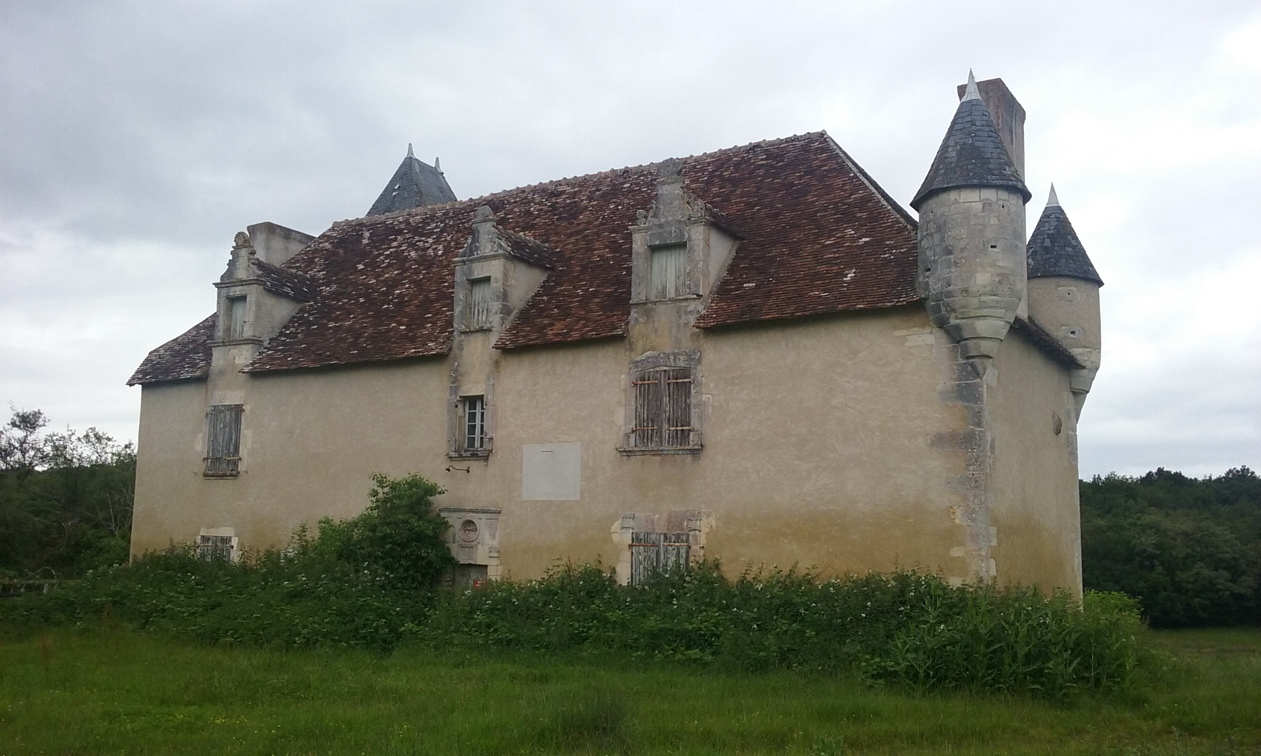 Maison noble du XVIème siècle dans son état en 2016. Façades et toitures inscrits aux Monuments Historiques en 1972.